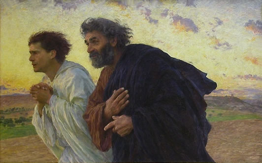 Die Jünger Johannes und Petrus eilen am Ostermorgen zum Grab.